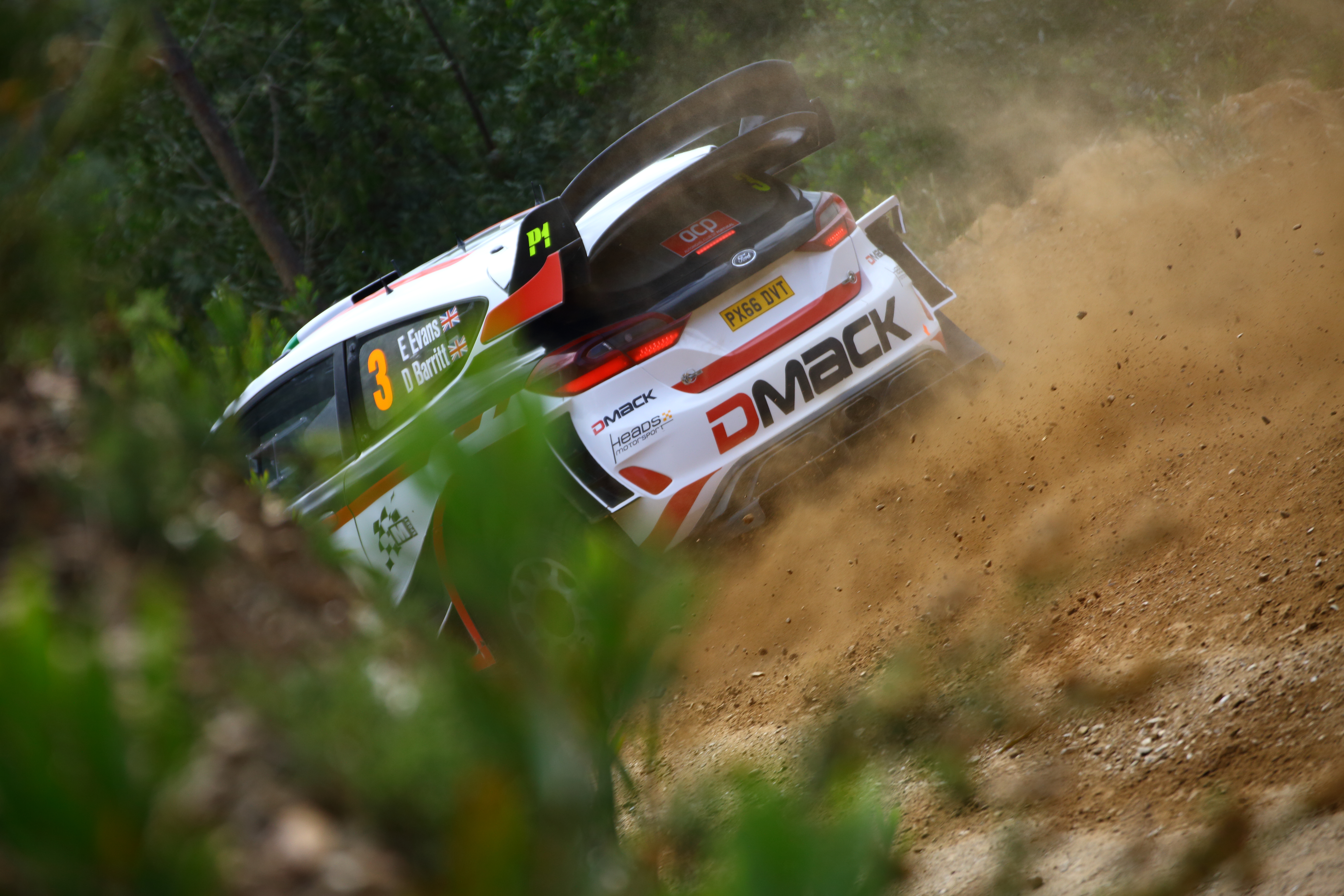 2017 Rally Portugal